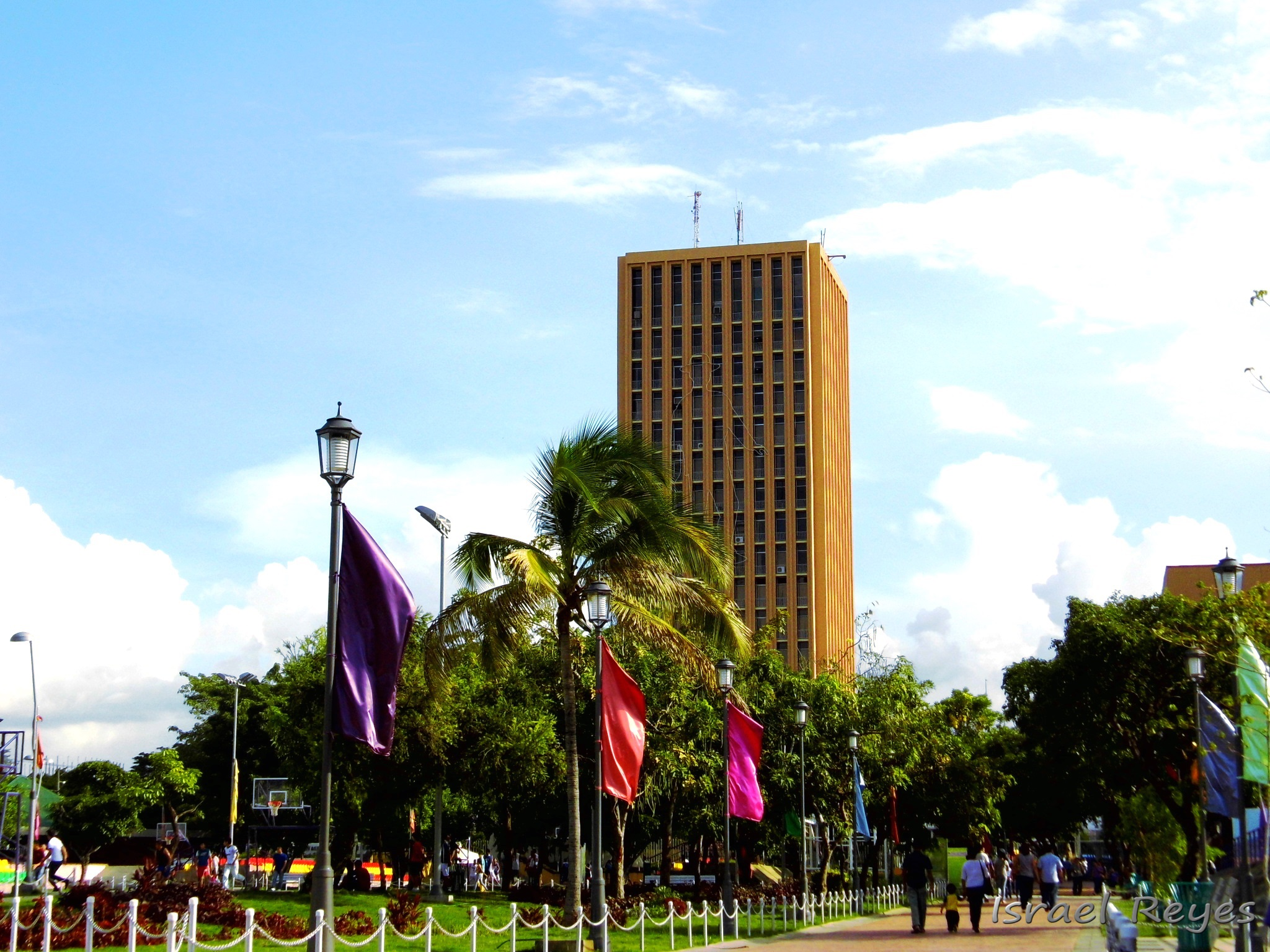 Edificio Benjamín Zeledón, Foto tomada desde el Parque Luis Alfonso Velásquez Flores. Cara Norte del Edificio.